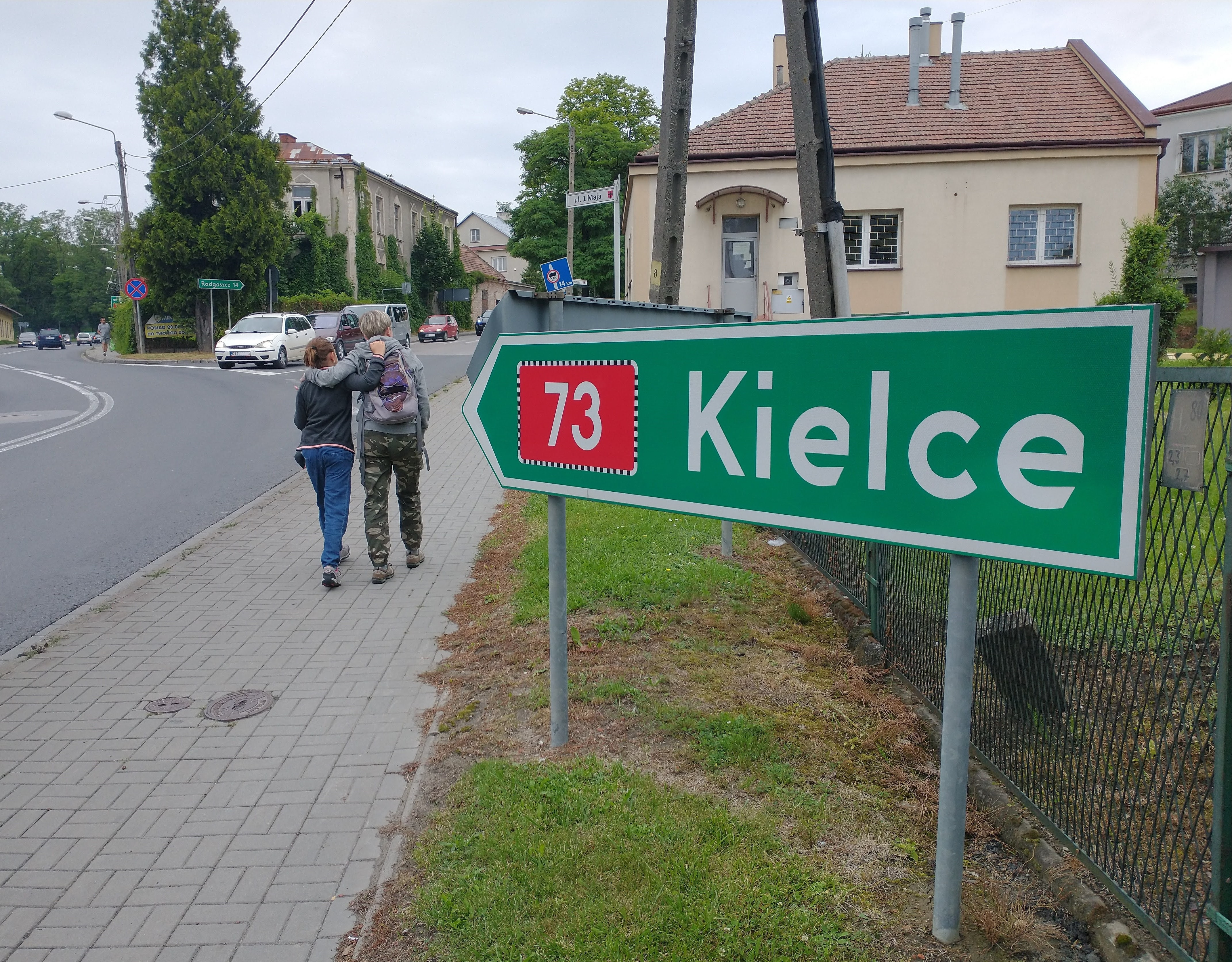 Widok miejski z Dąbrowy Tarnowskiej.